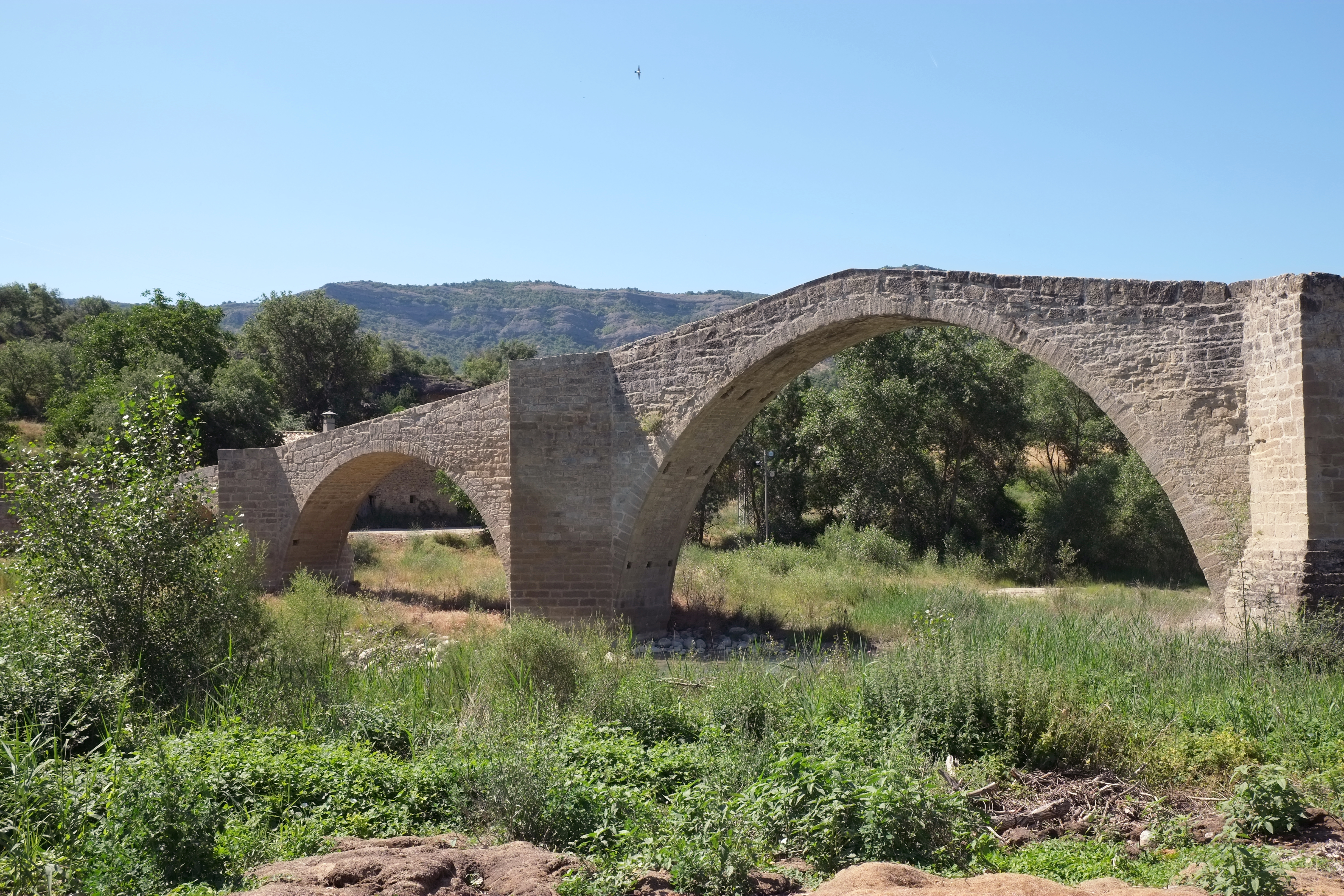 Romanische Brücke in Capella in Aragonien (Spanien).